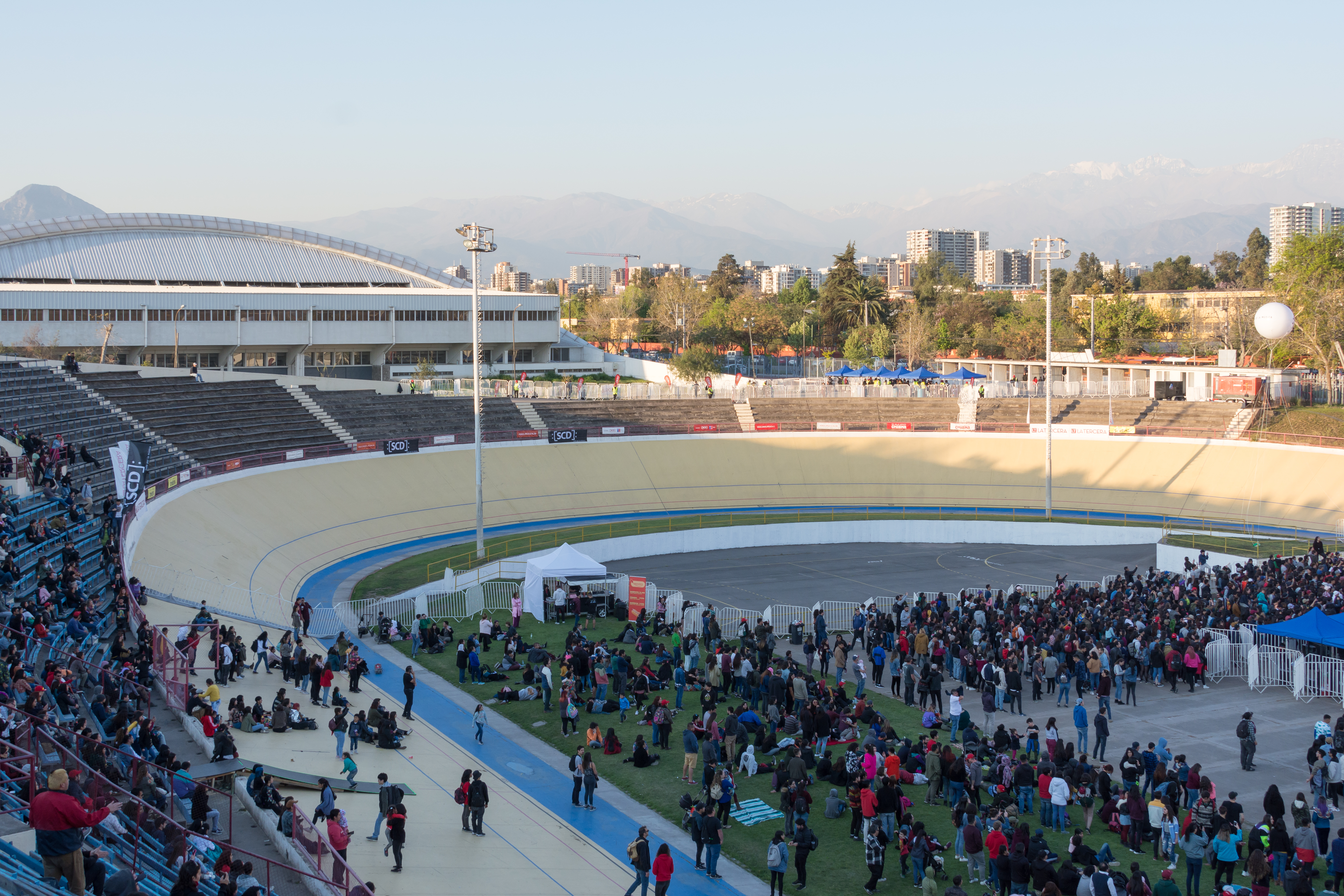 Día de la música chilena 2019, Velódromo del Estadio Nacional, Ñuñoa, Santiago, Chile.